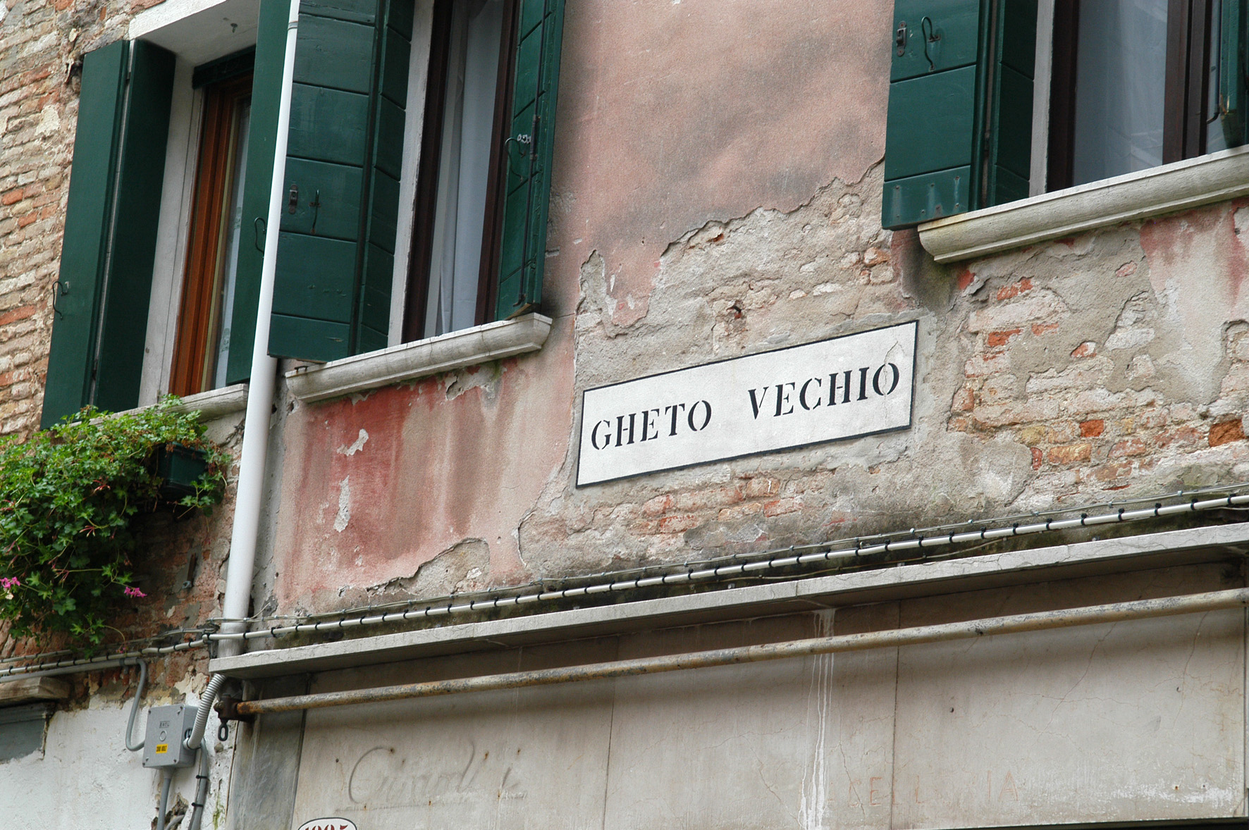 Gheto Vechio